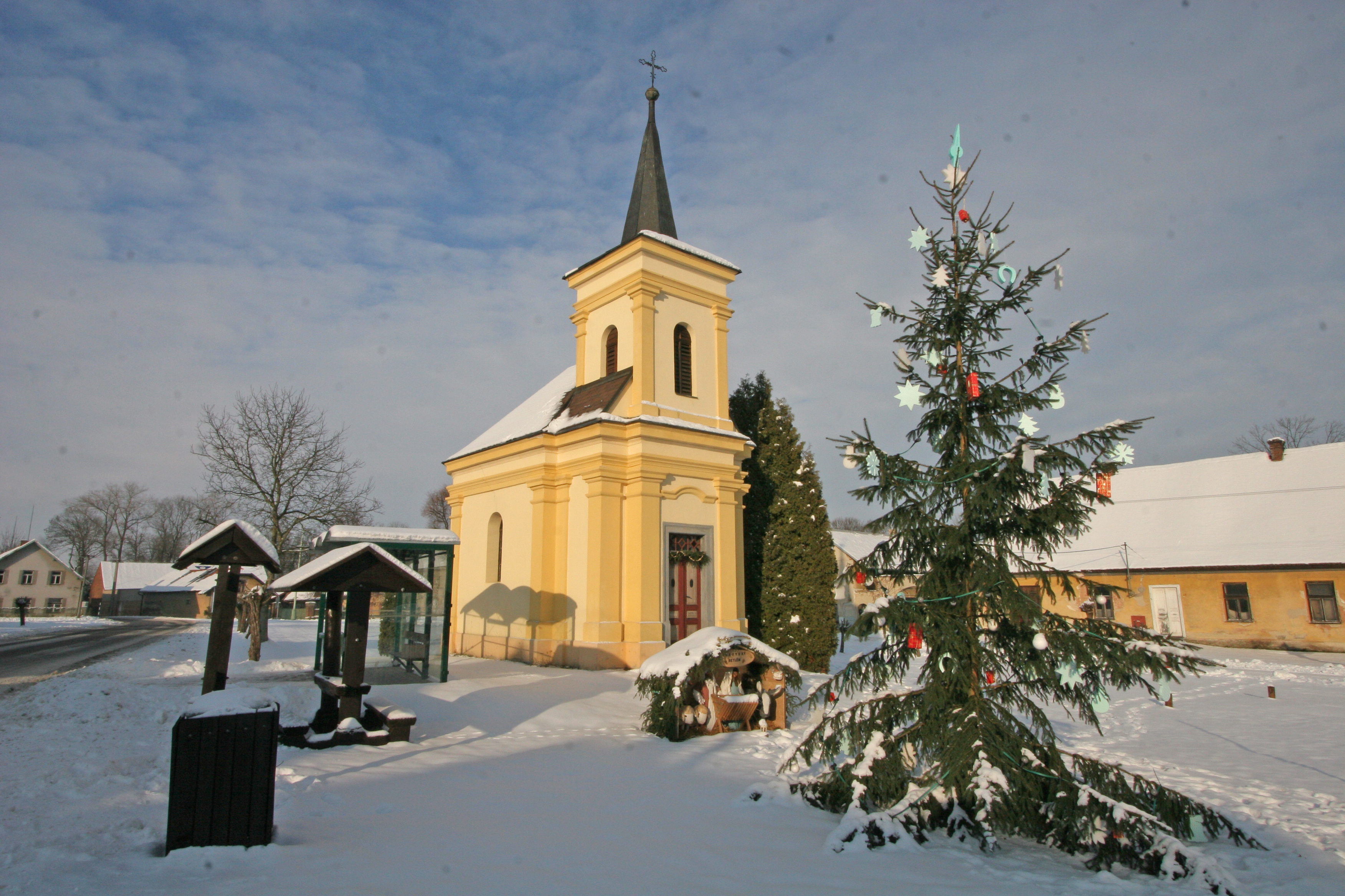 Turov čp. 44